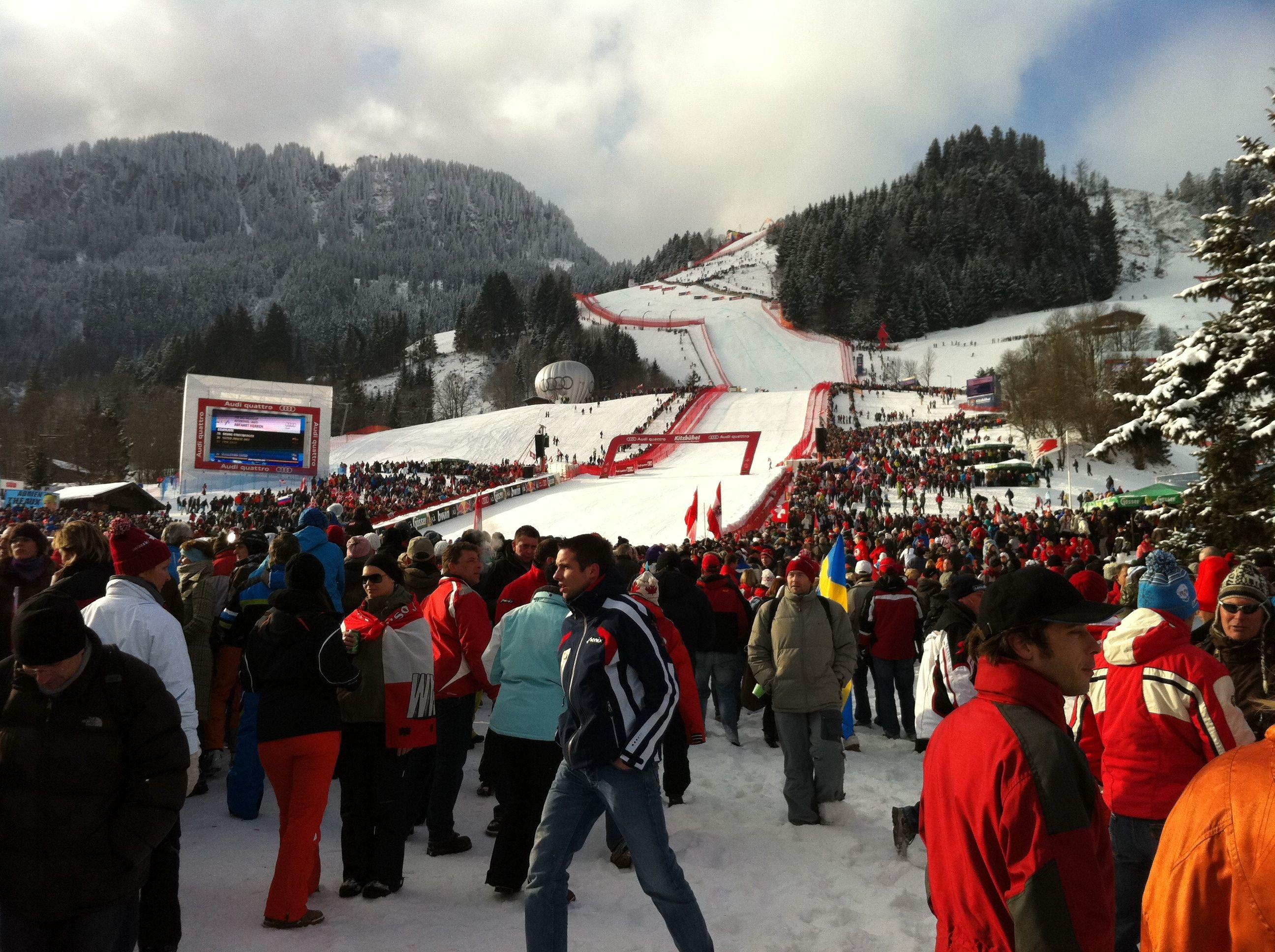 Projekt 365: Ein Jahr lang - jeden Tag ein Foto.